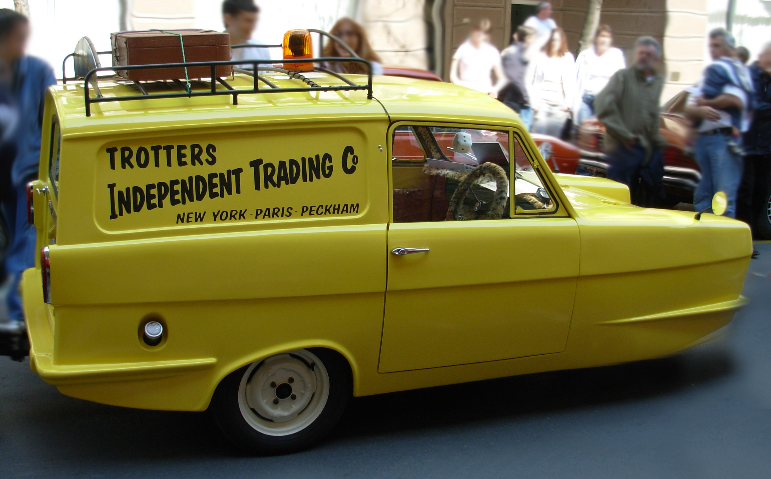 Trotters u Beogradu! Snimljeno na izložbi u Jevremovoj ulici. Autor Goldfinger